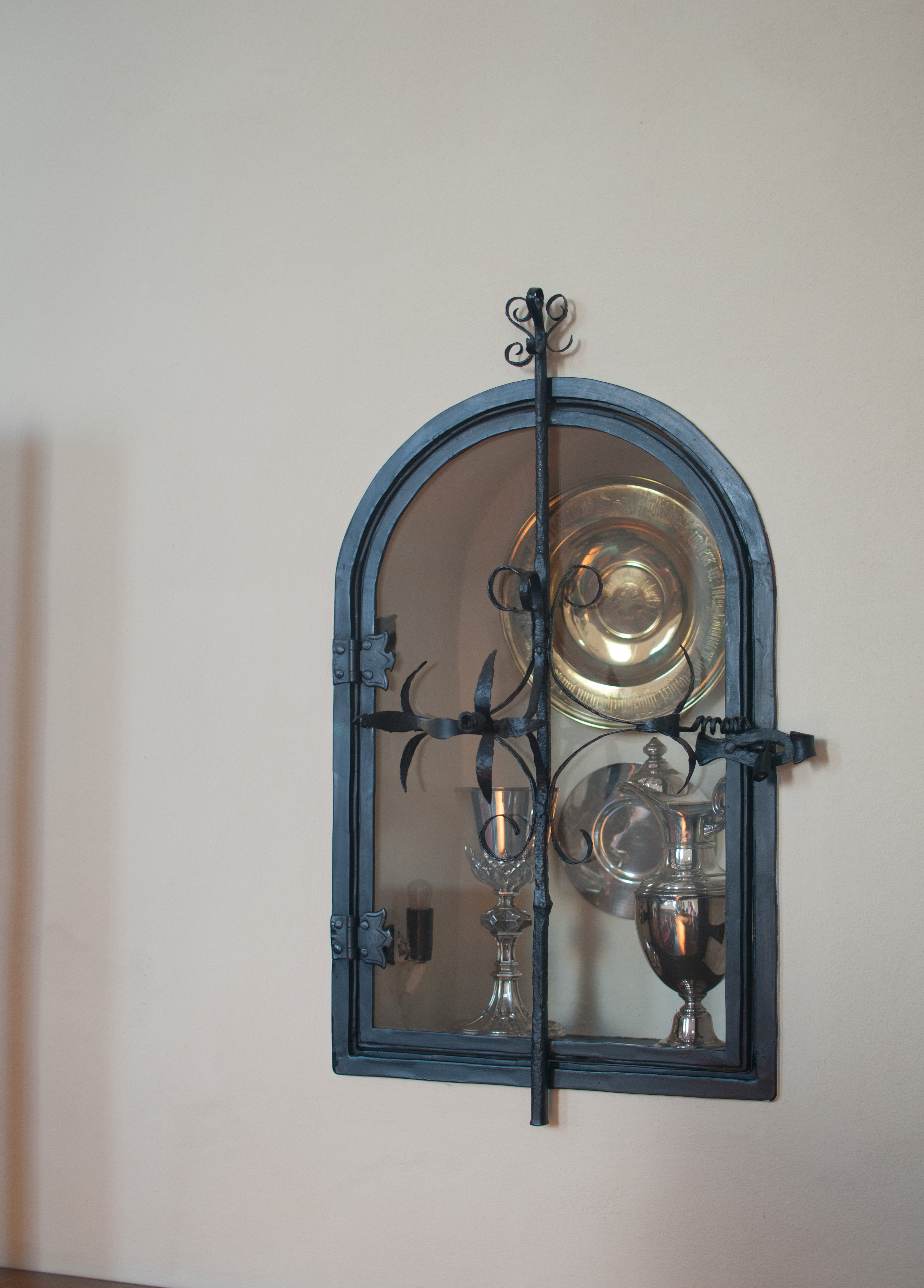 Medebach, evangelische Kirche, Tauf- und Abendmahlgeräte